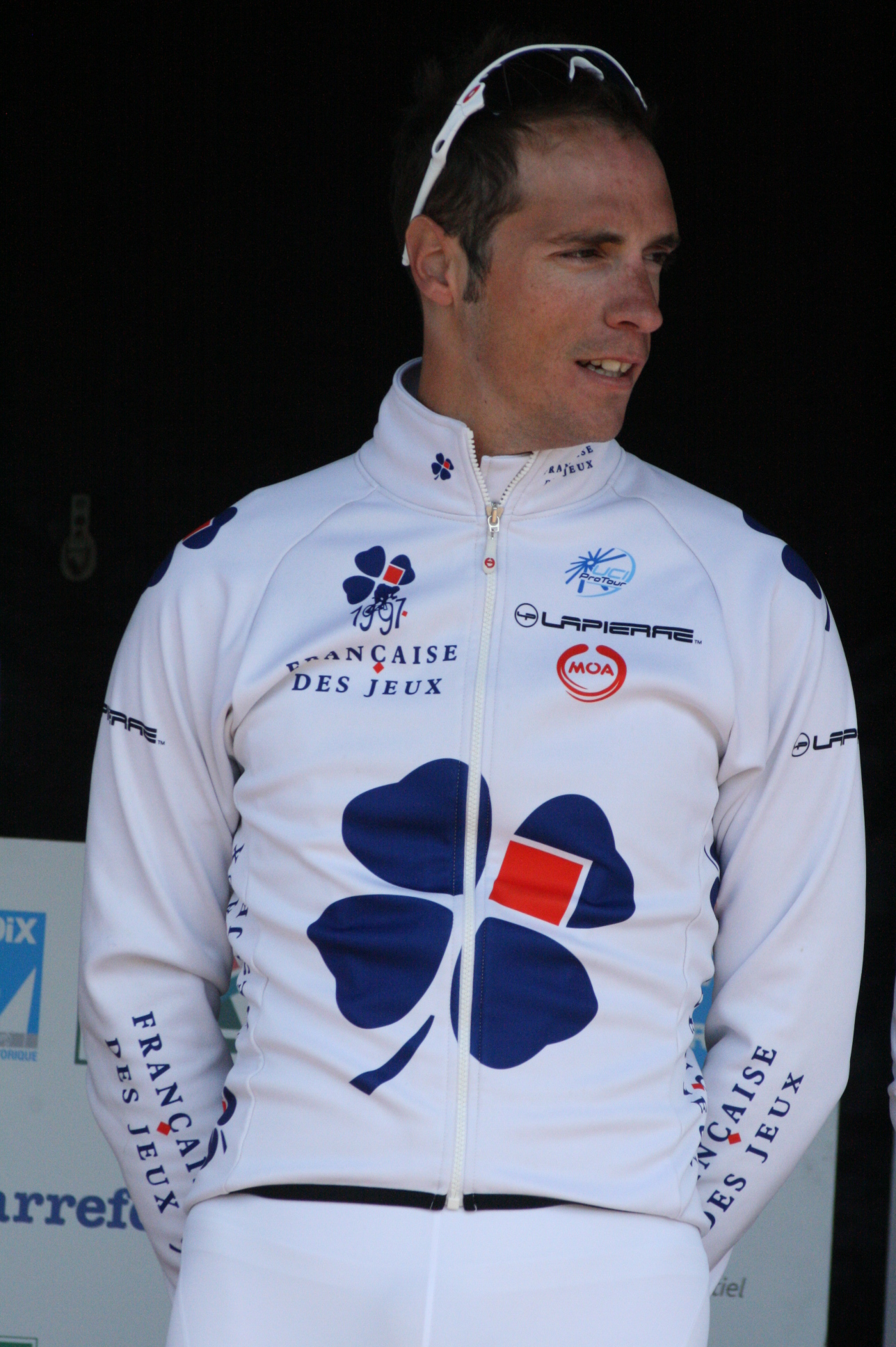 Sébastien Chavanel, lors de la présentation des équipes des 4 jours de Dunkerque 2010